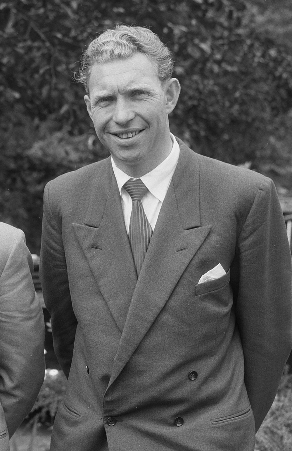 Ondertekening van contracten van Tour de France ploeg ten huize van Cees Pellenaars te Breda, Henk Faanhof